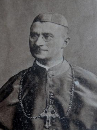 Adam Senger *1860†1935 Weihbischof in Bamberg (1912-1935)